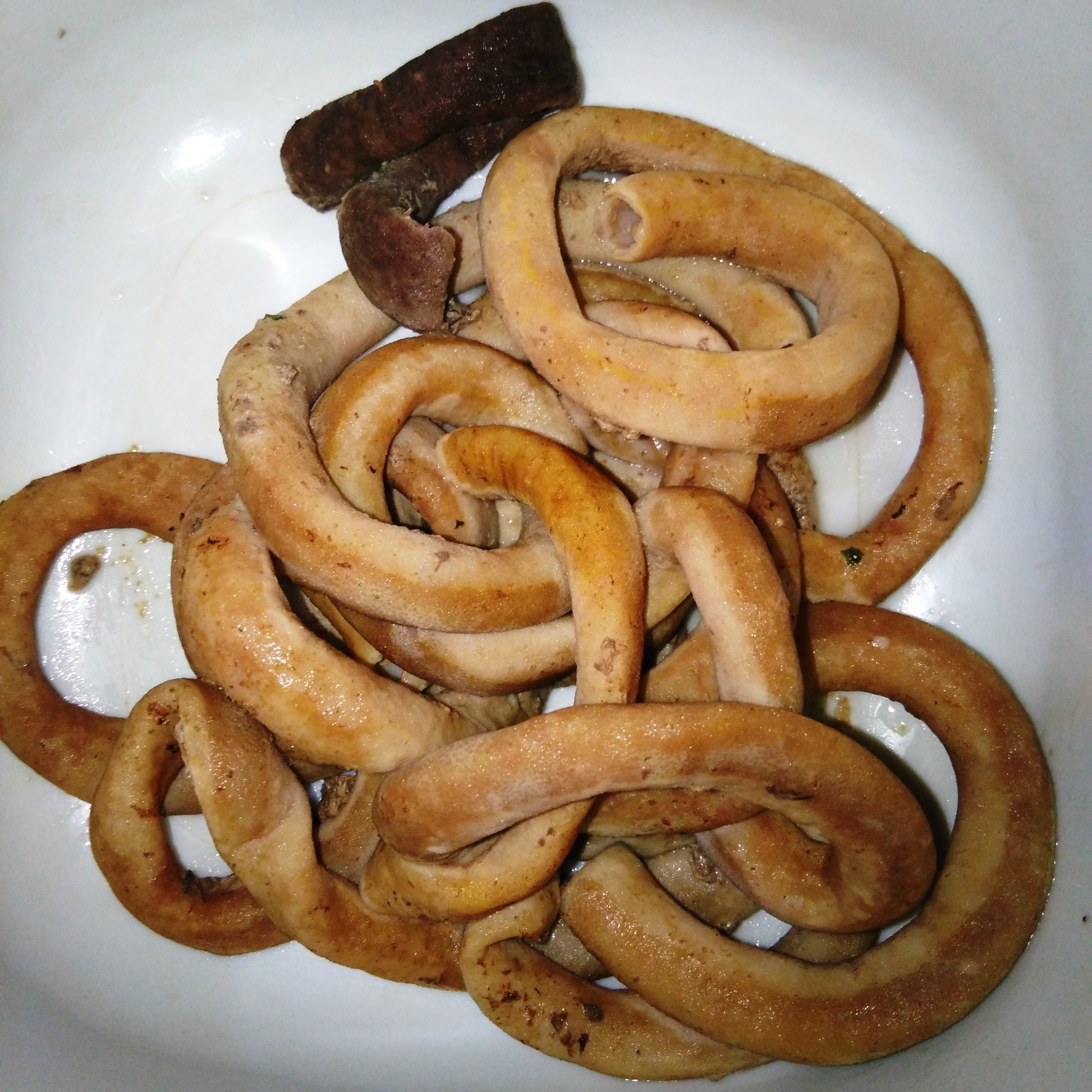 Lòng gà nhà mệ (nhậu tháng 9 năm 2018)